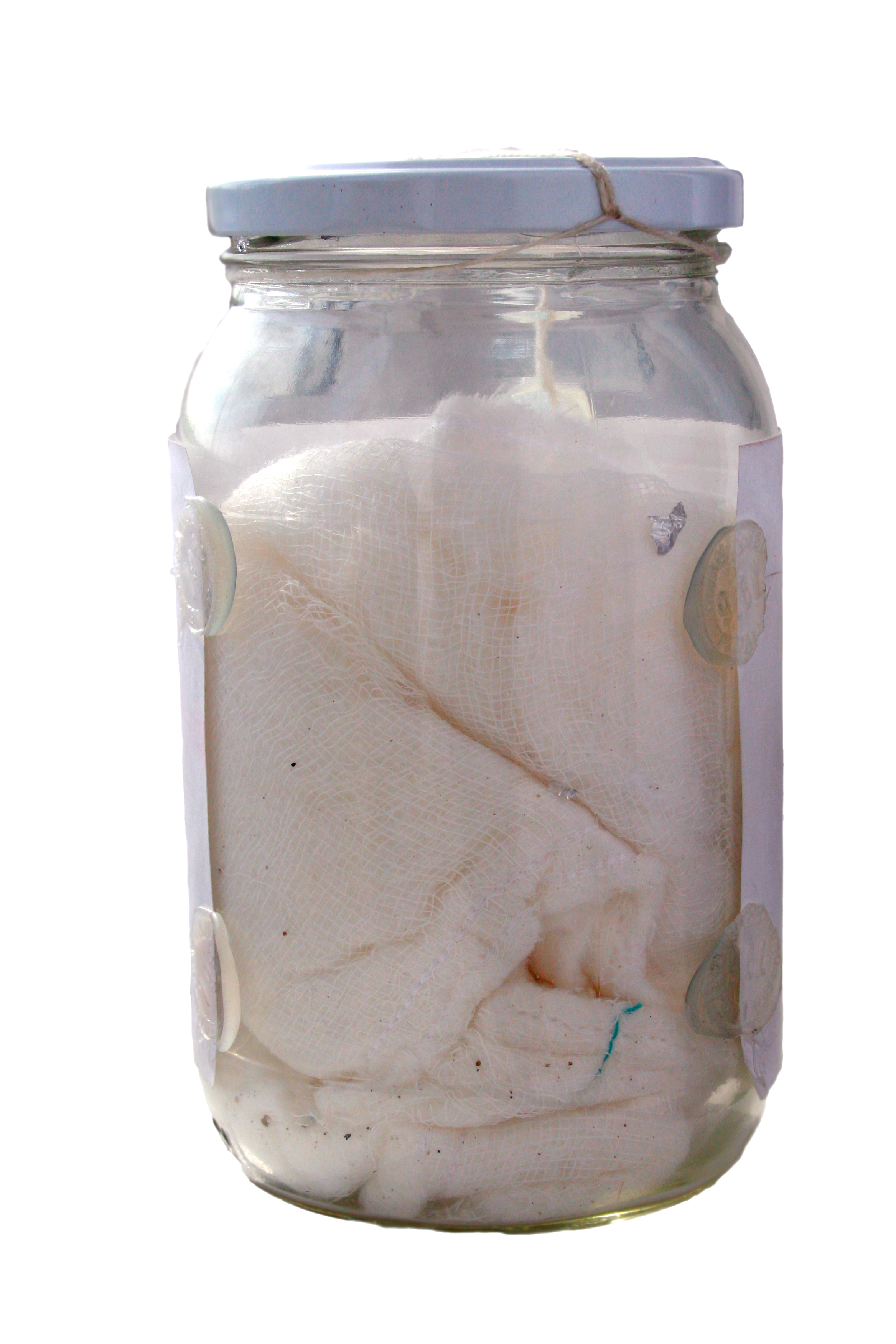 Zapach pobrany na miejscu zdarzenia i zabezpieczony w słoiku